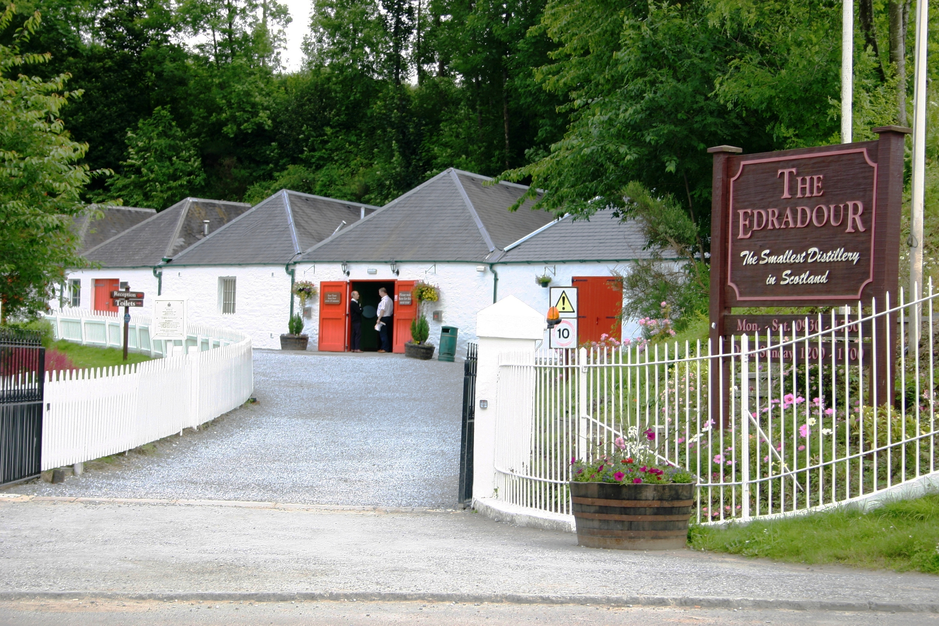 Der Eingang zur kleinsten legalen Destillerie in Schottland